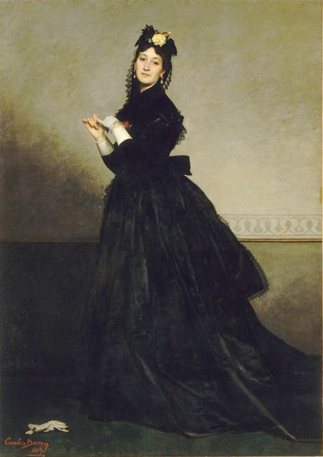 Carolus-Duran Mme, née Pauline Croizette, épouse du peintre (1839-1912)